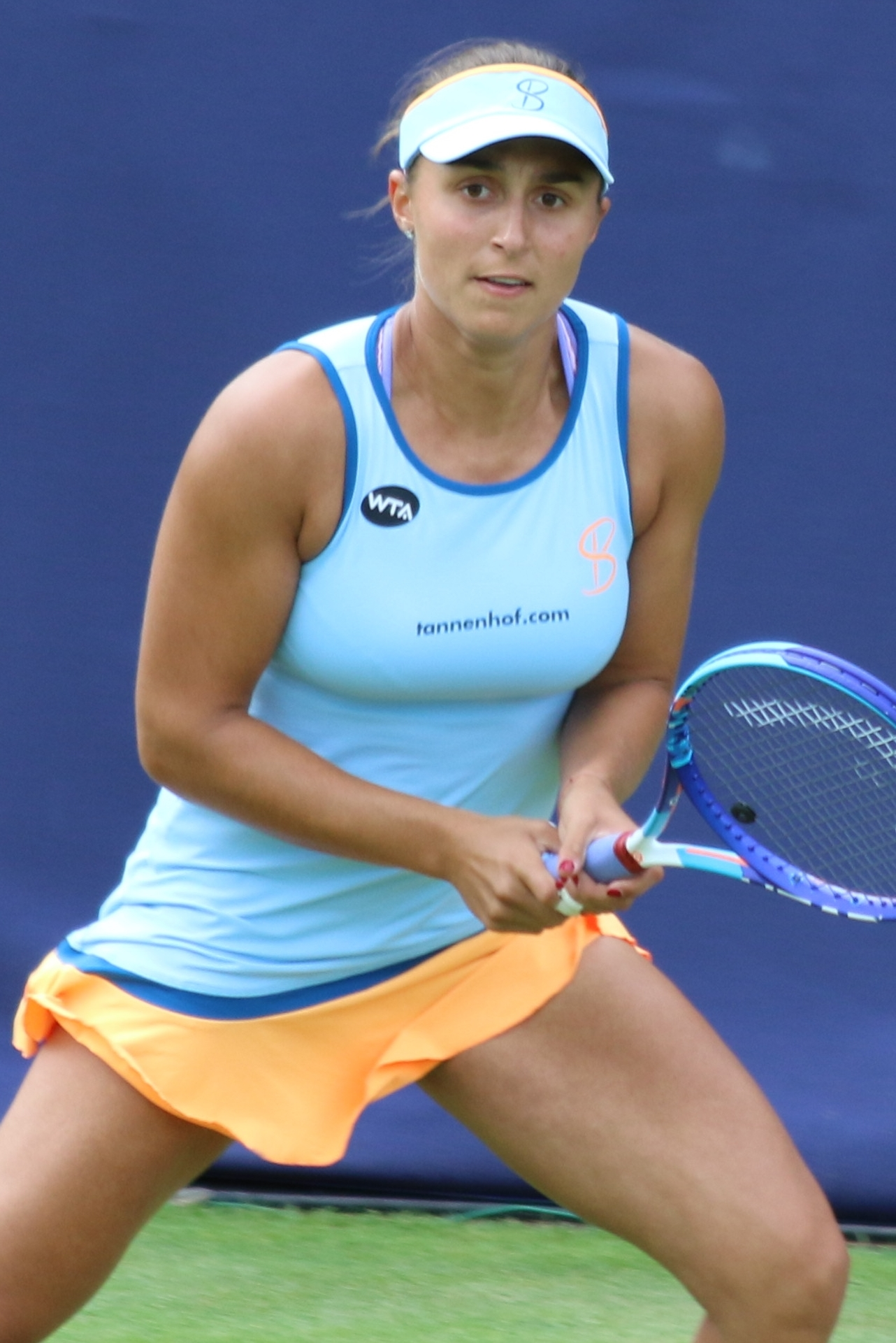 Paszek BM16 (27)